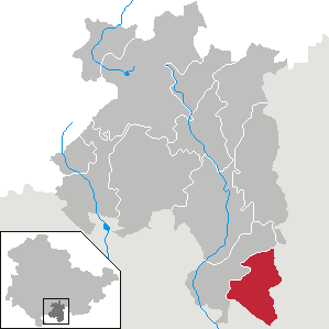 Neuhaus-Schierschnitz in Thüringen, Landkreis Sonneberg